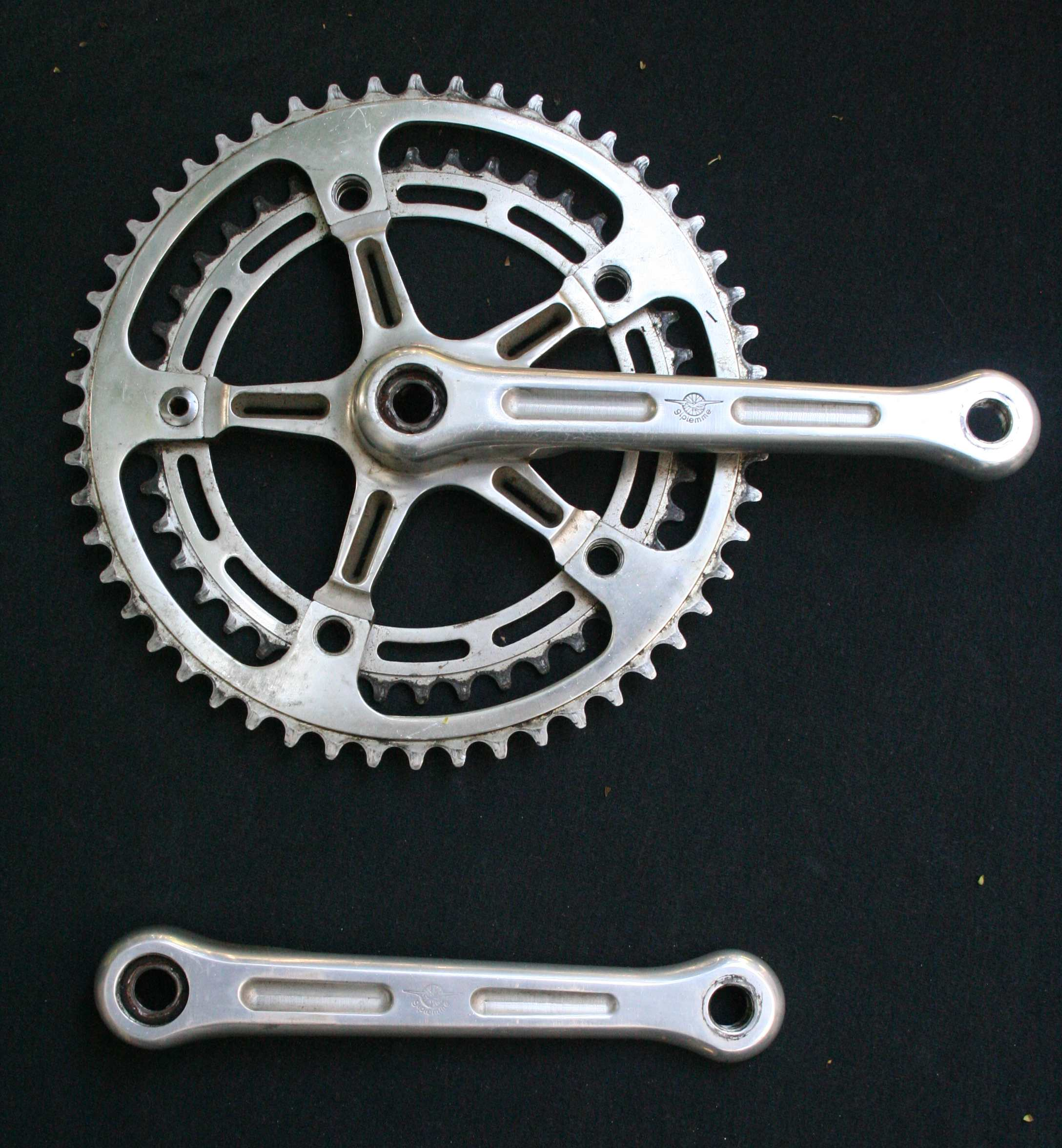 GPM Kurbel